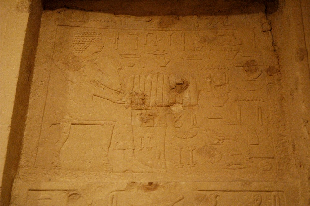 Die Kultkammer des Ka-ni-nisut im Kunsthistorischen Museum Wien von der Mastaba des Ka-ni-nisut aus Giza, Grabung Hermann Junker 1913. Westwand, nördliche Scheintür, Speisetischszene. Inv.Nr. 8006